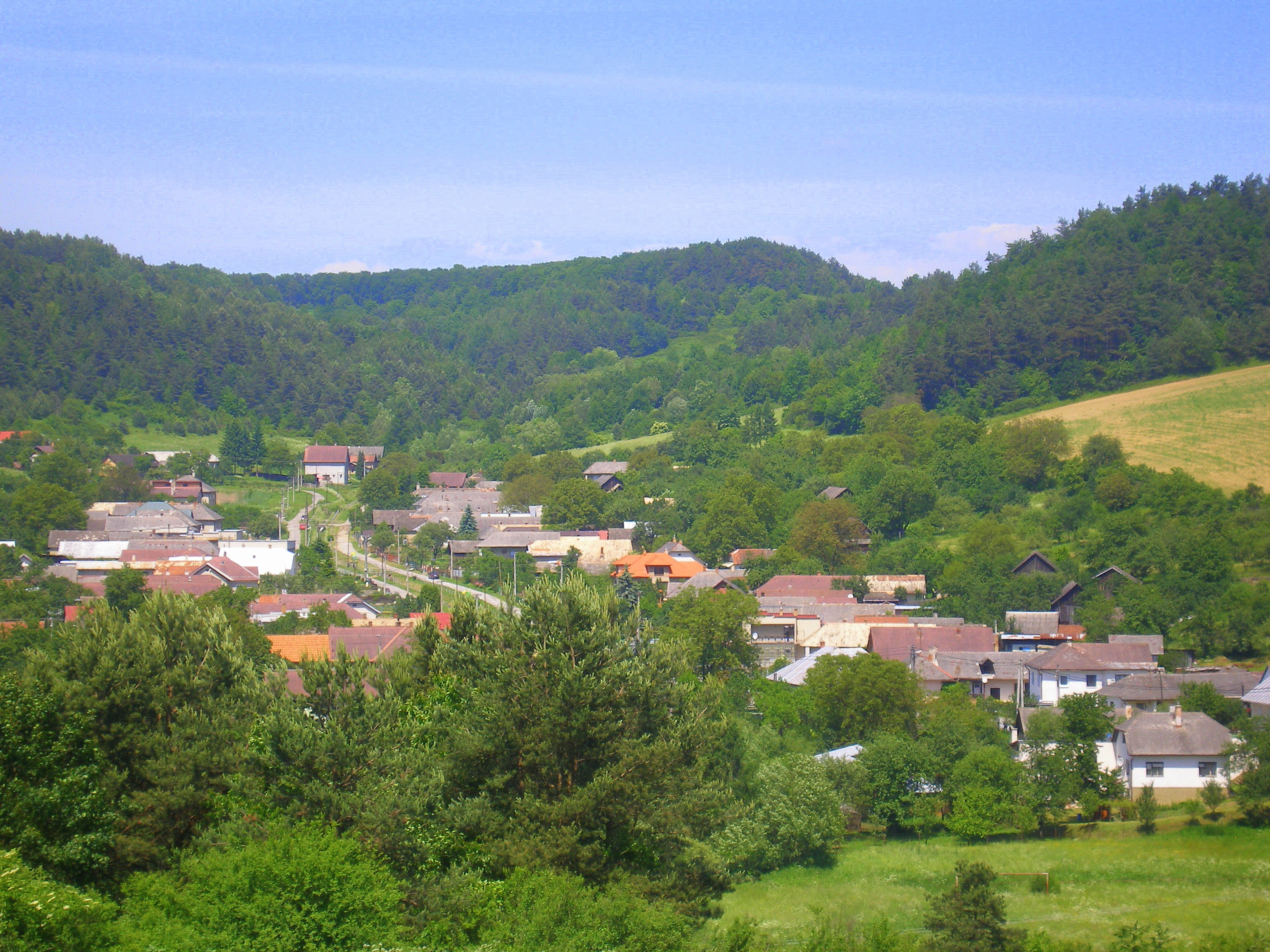 Obec Suchá Dolina. Pohľad z juhu.